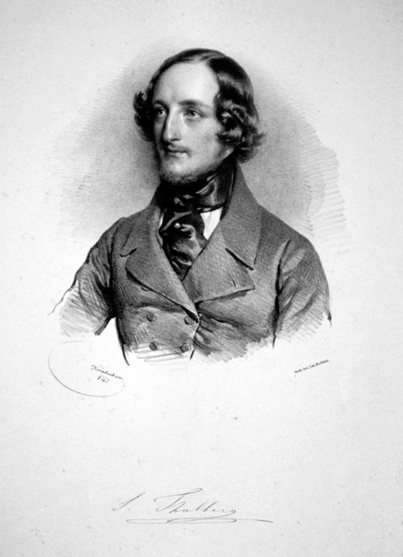 Sigismund Thalberg, Lithographie von Joseph Kriehuber, 1841